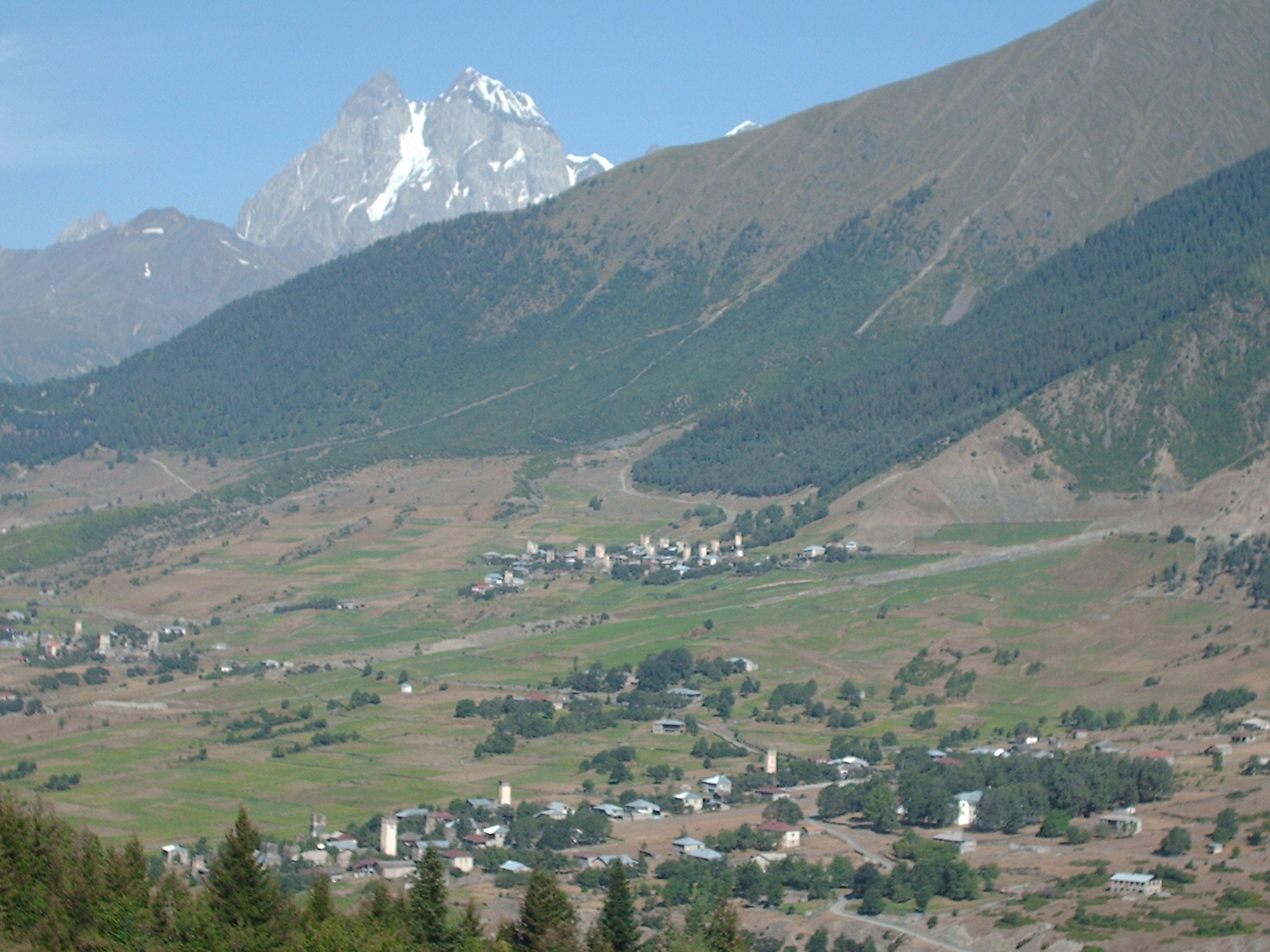 Mestia